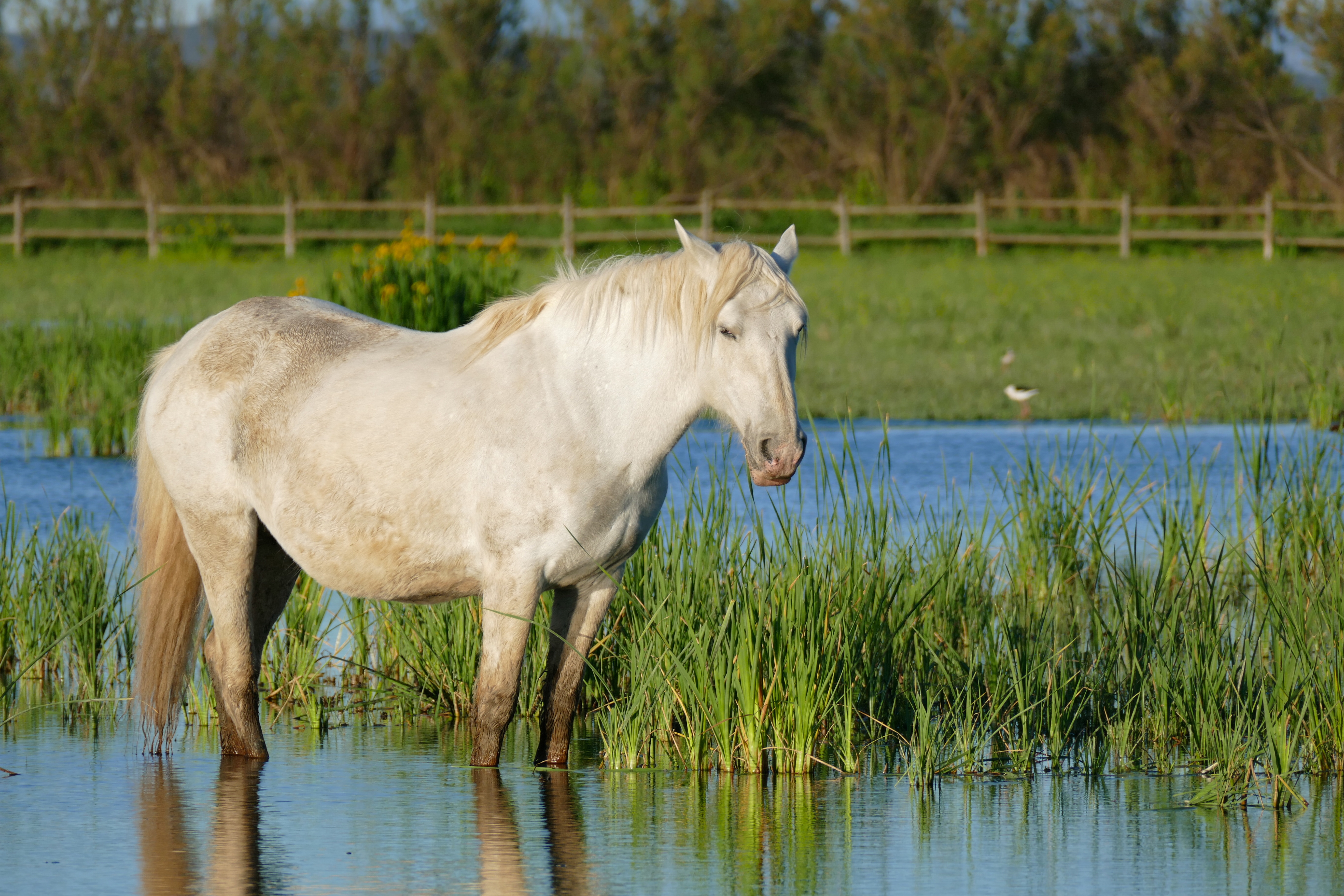 Estanys del Matar, Los Aiguamolls del' Empordà, Castelló d'Empúries, Catalunya, SPAIN